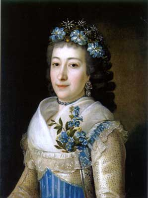 Авдотья Федоровна Повалишина, ур. Пасынкова